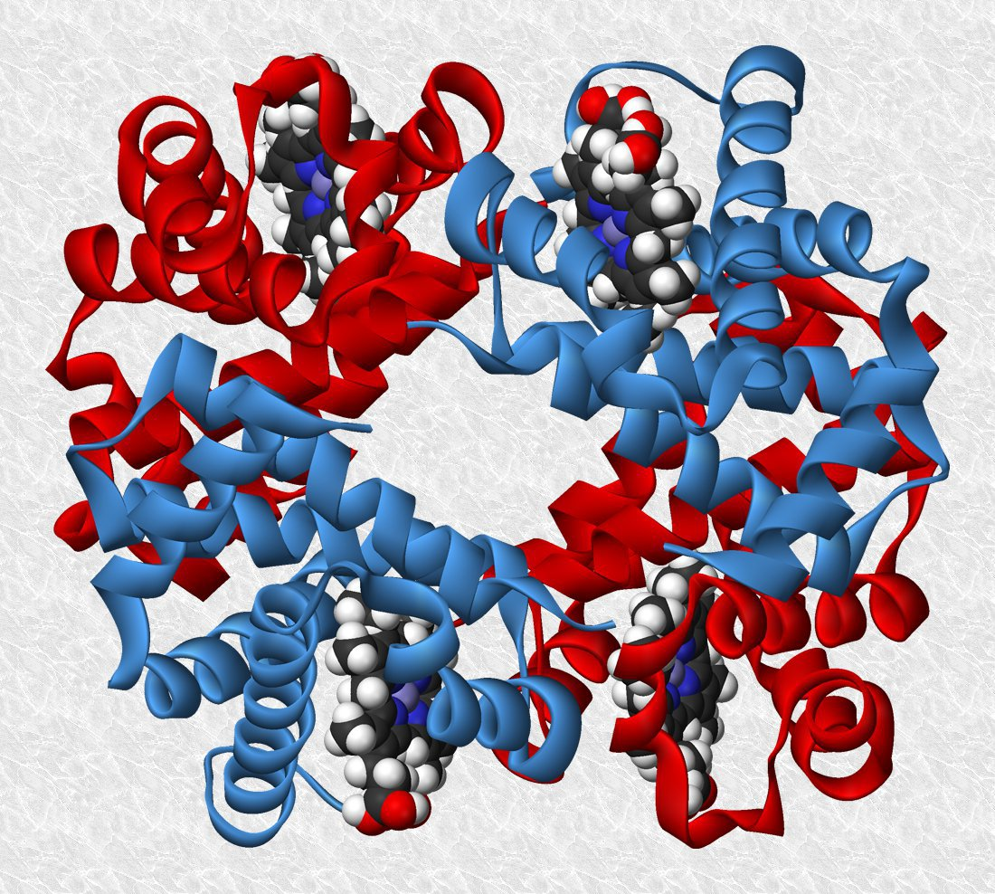 Estructura cuaternaria de la hemoglogina